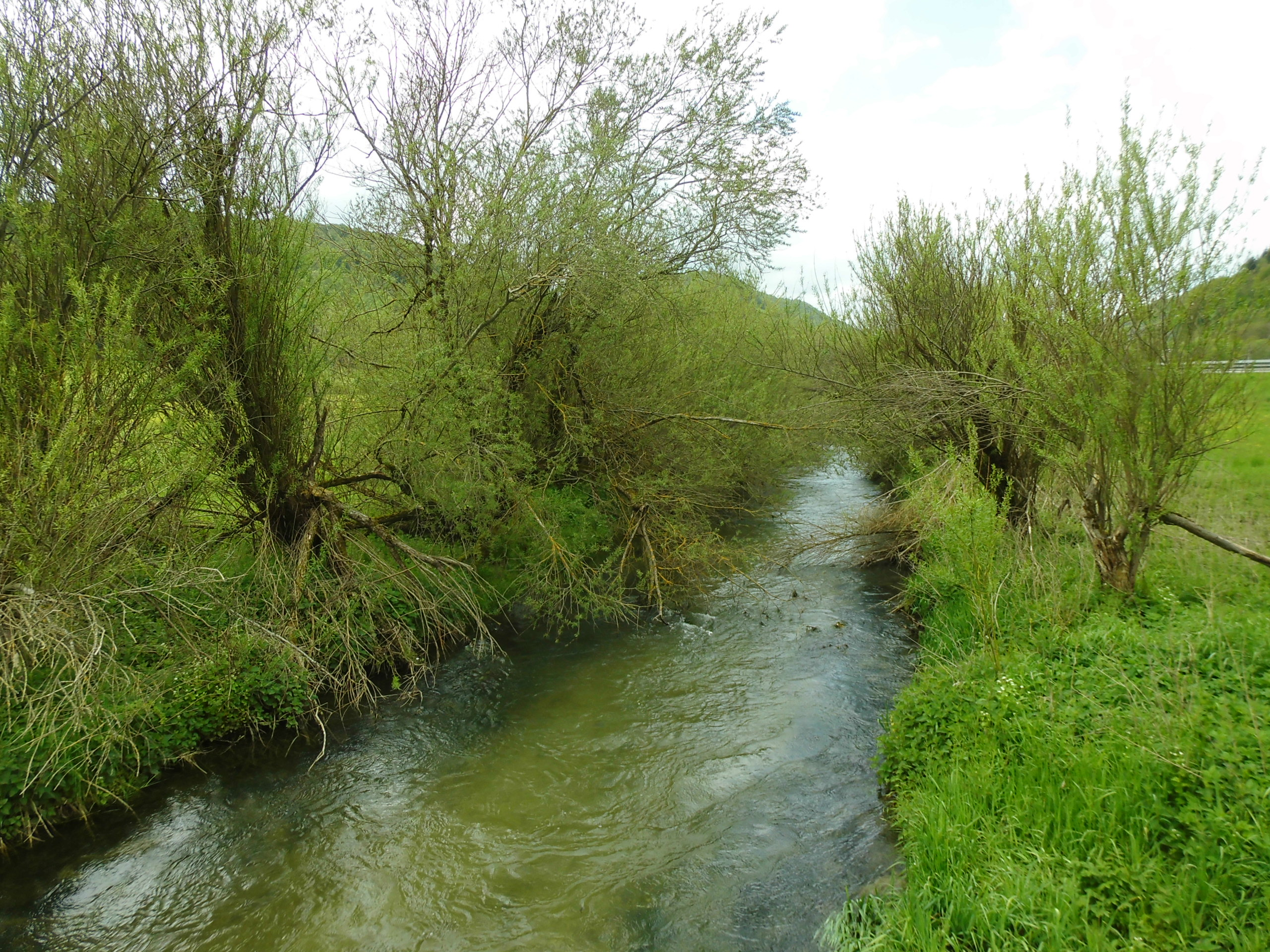 Schmiecha im Naturschutzgebiet Eselmühle (Schutzgebiets-Nr. 4.307) zwischen Albstadt-Ebingen und Straßberg. Blick nach Westen.